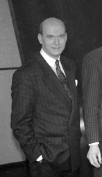 Pim Fortuyn